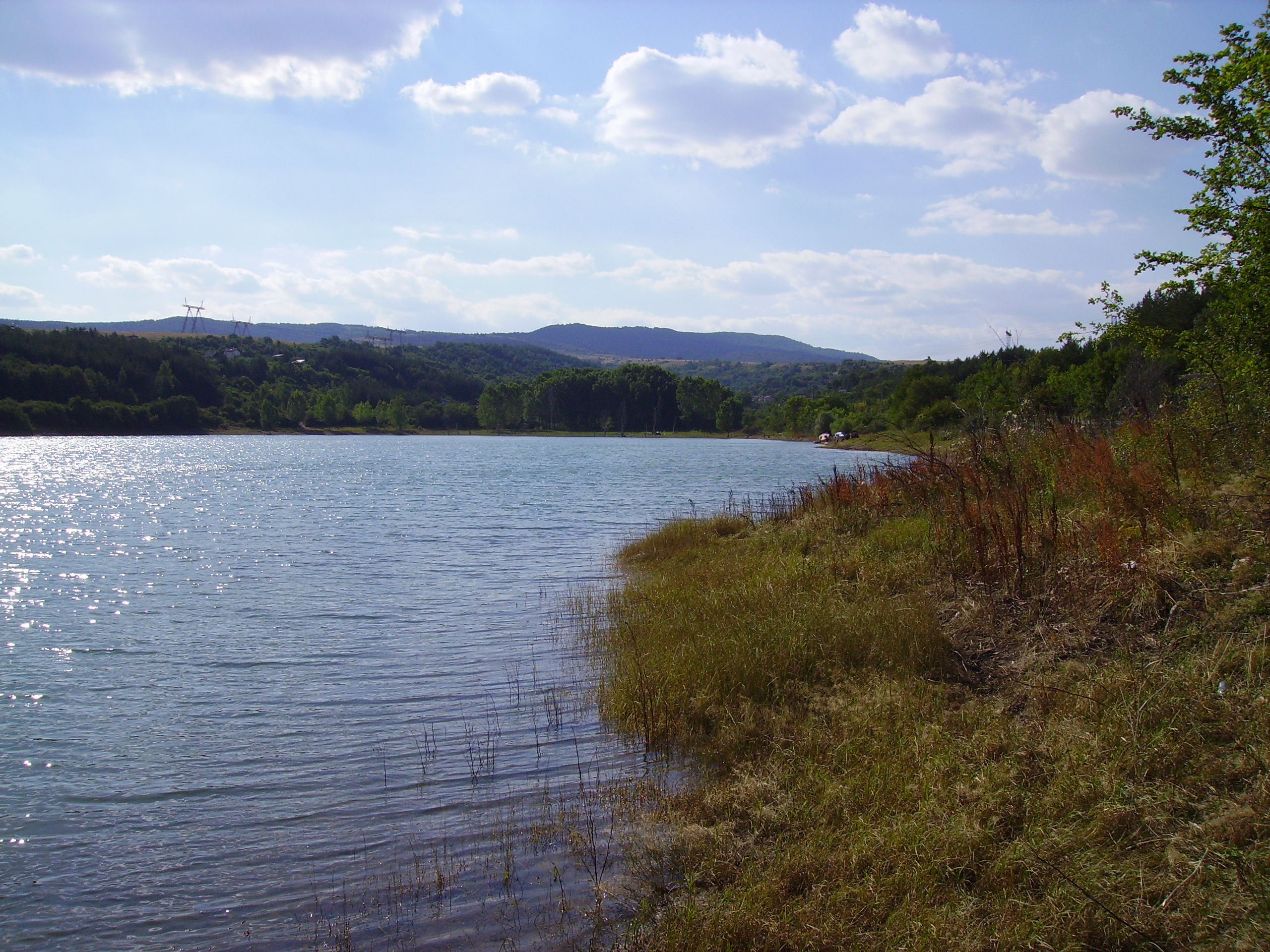 Изглед към с. Кременик от Язовир "Дяково"